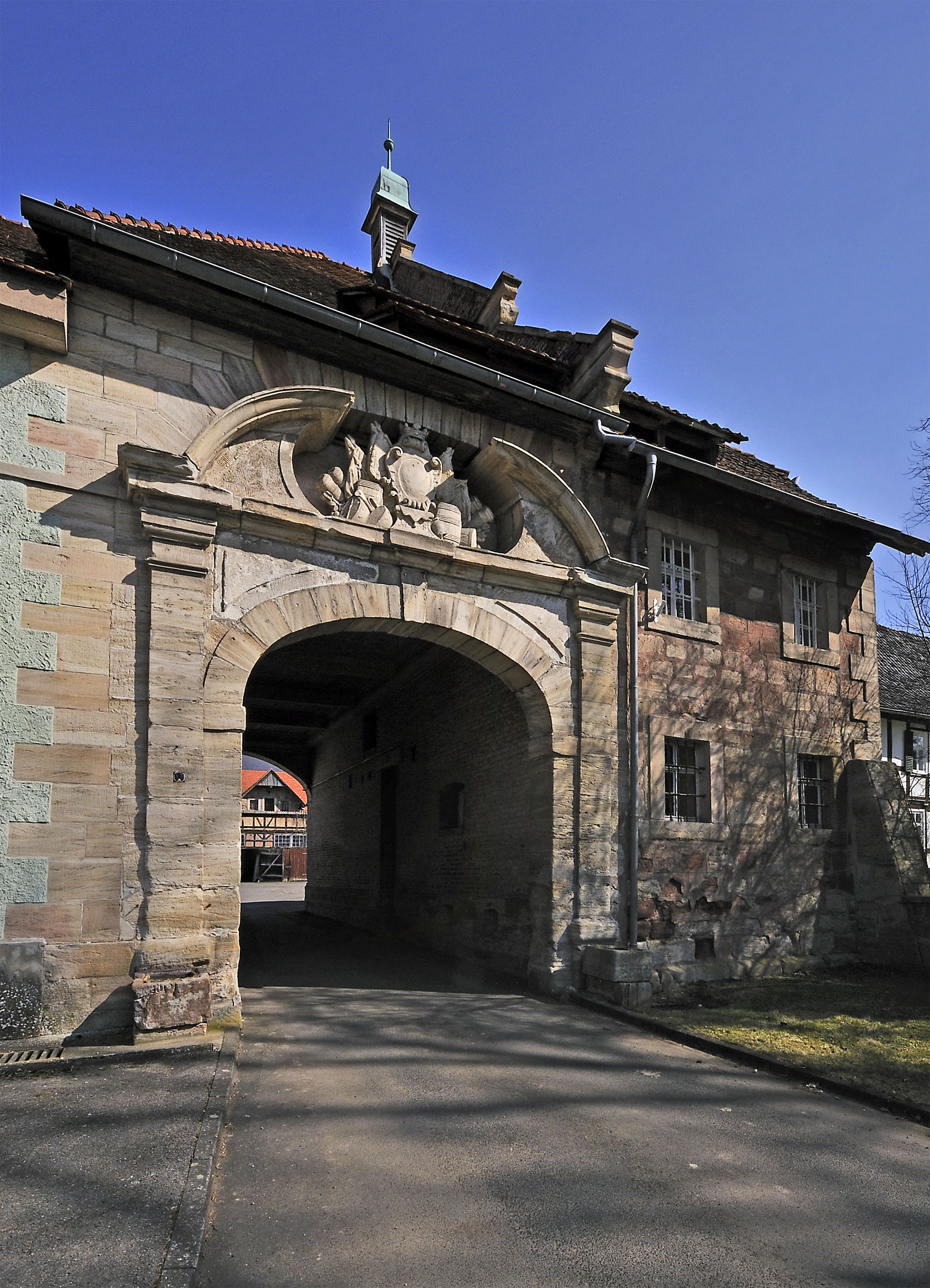 Rittergut Völkershausen Torhaus - Blick aus West